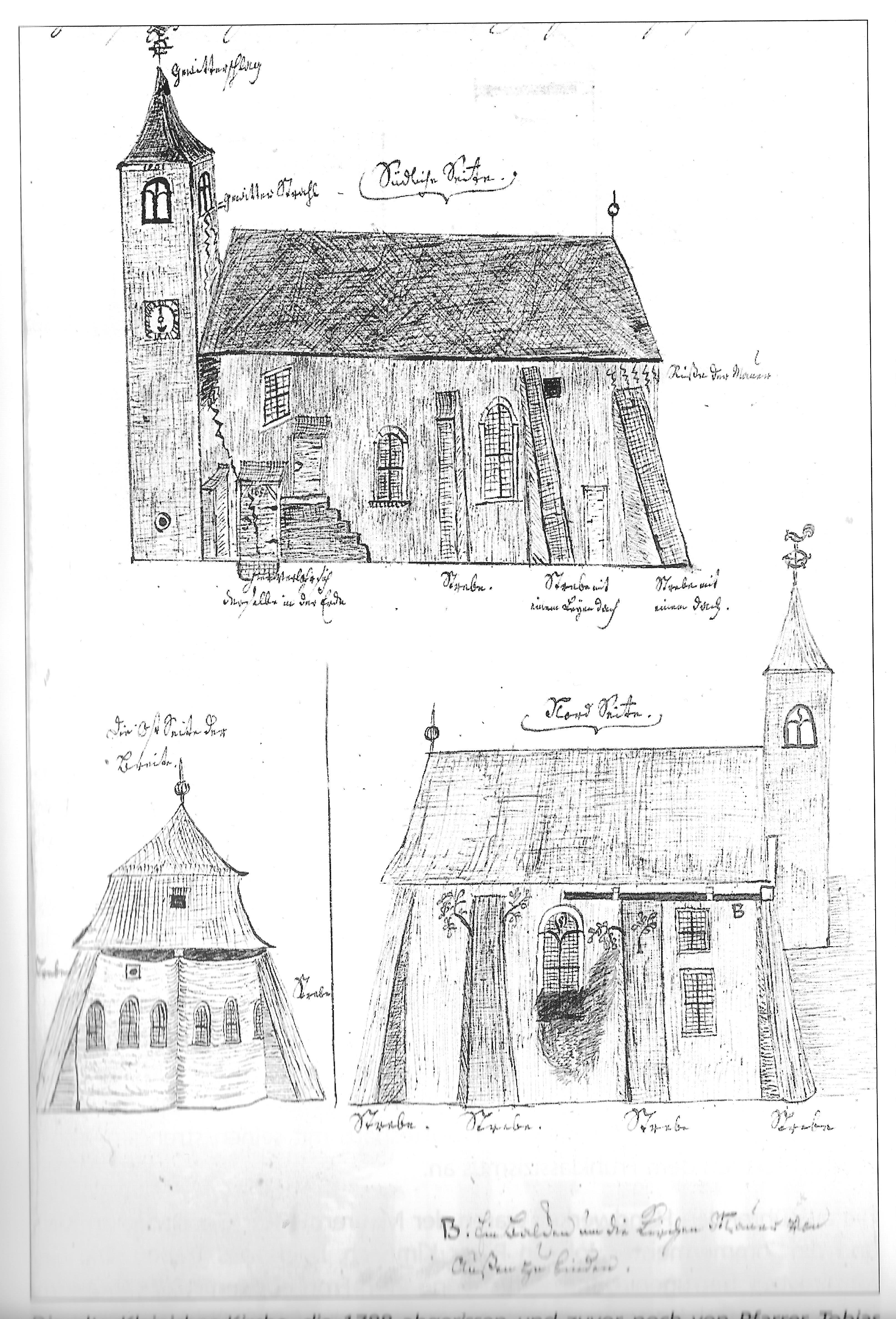 Zeichnung von 1788 der alten Kleinicher Kirche von Pfarrer Tobias Schneegans. Die Kirche wurde kurz darauf abgerissen.